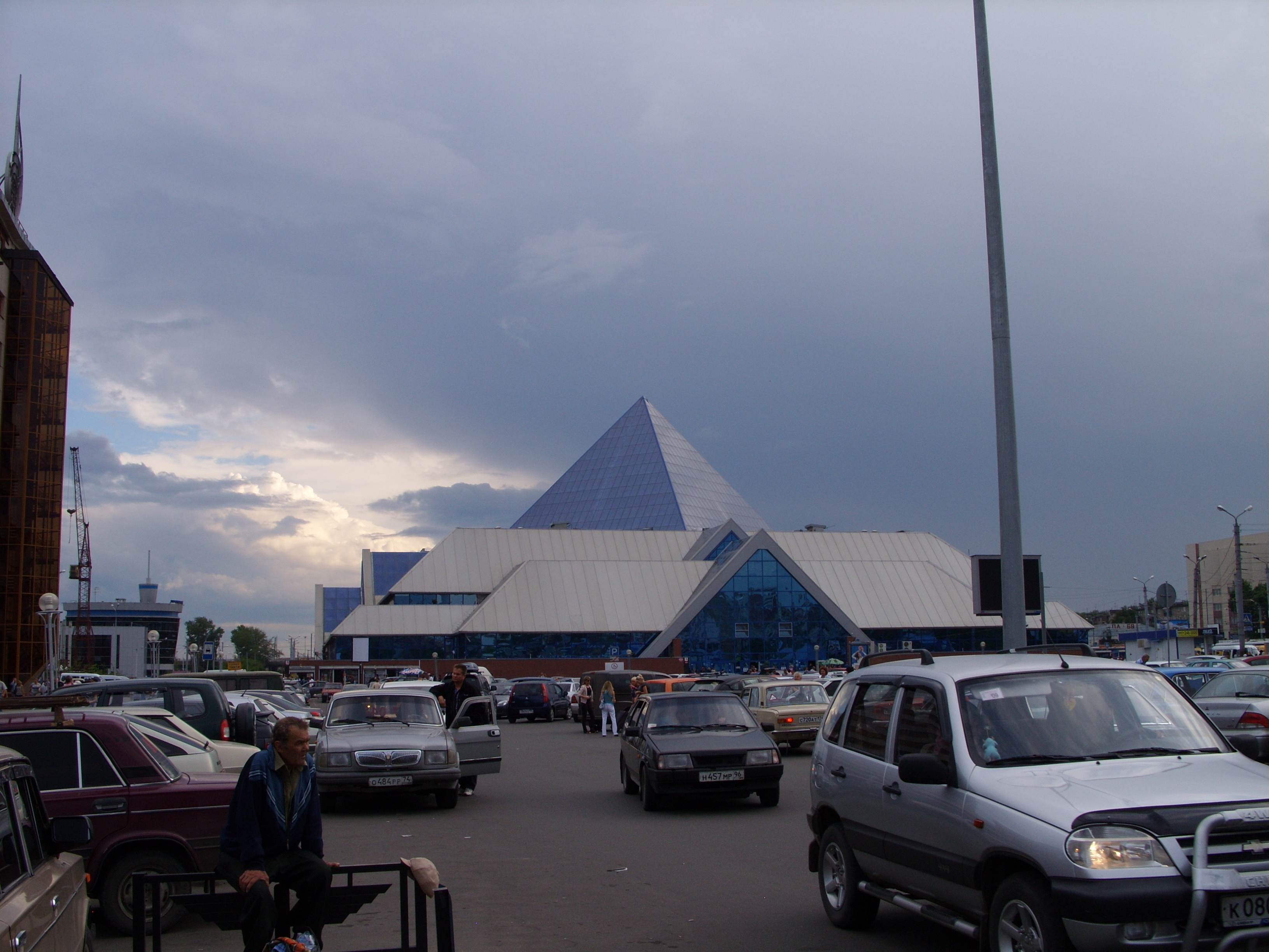 снимки июля 2009 г.